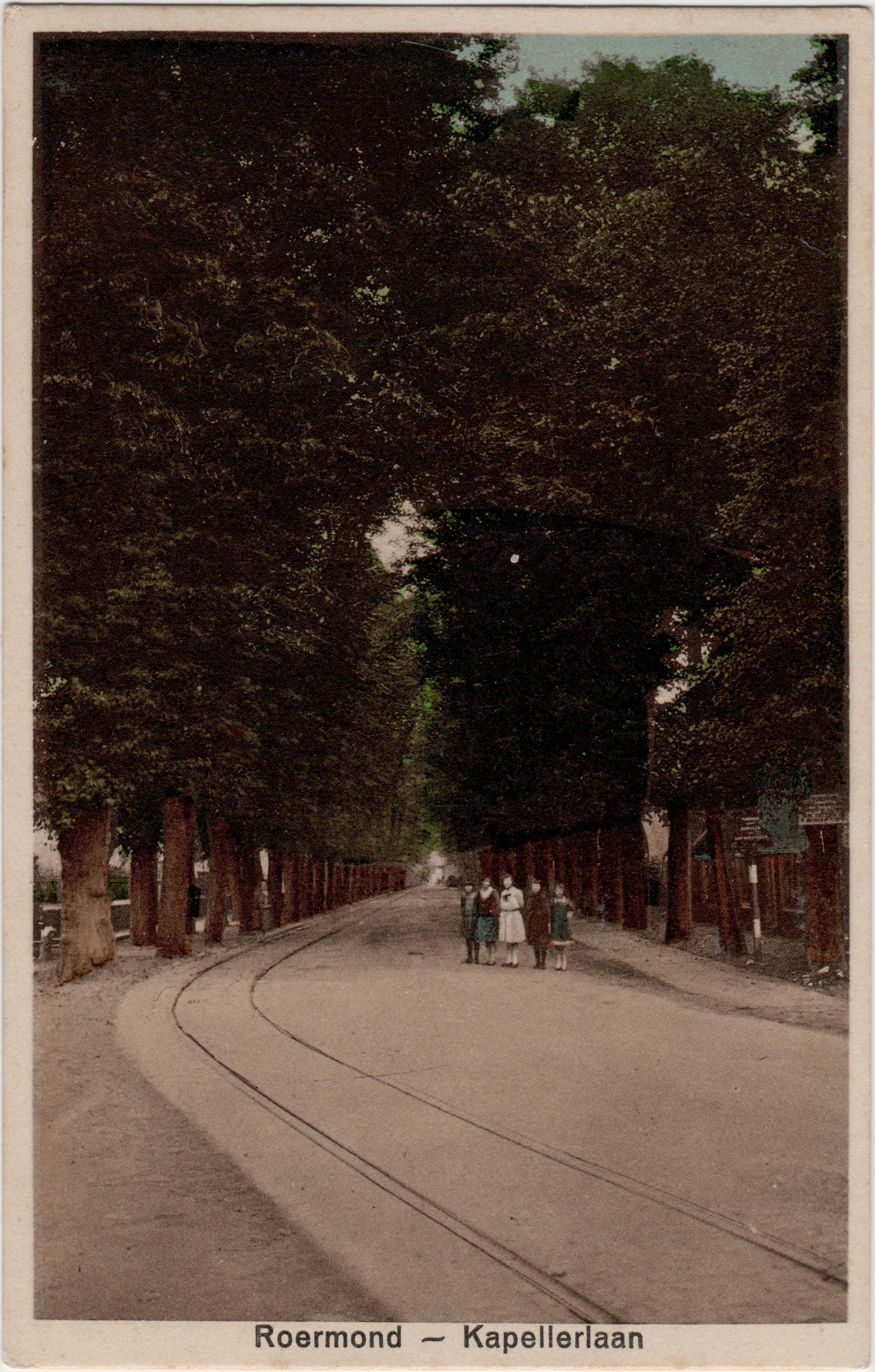 Kapellerlaan in Roermond gezien in noordelijke richting.